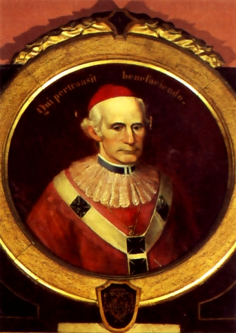 José Manuel Pasquel Losada (Lima, 1793 - 1857) xxi Arzobispo de Lima (1855 - 1857).